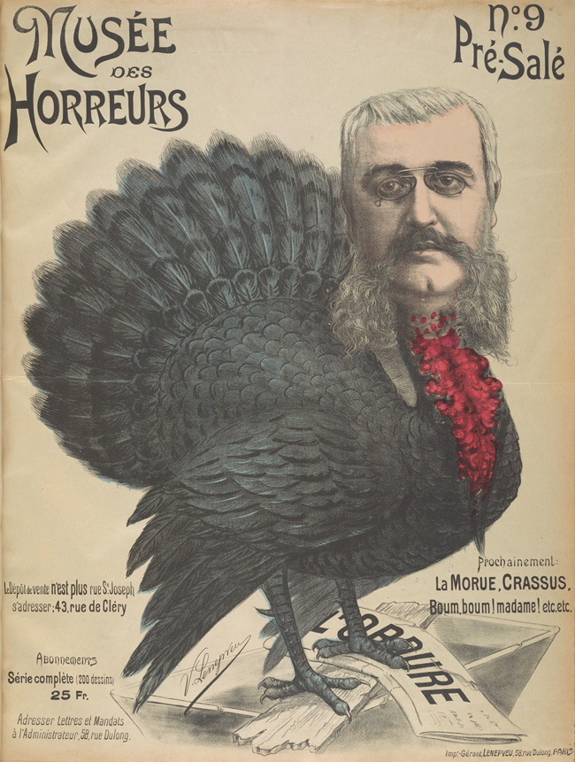 "Pré-Salé".